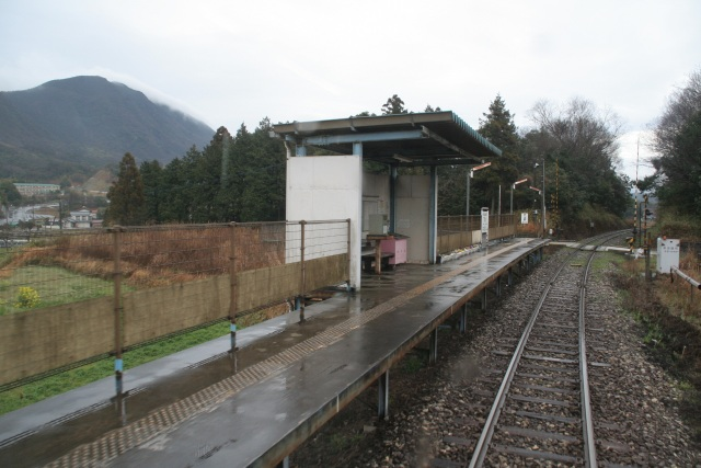 柿下温泉口駅